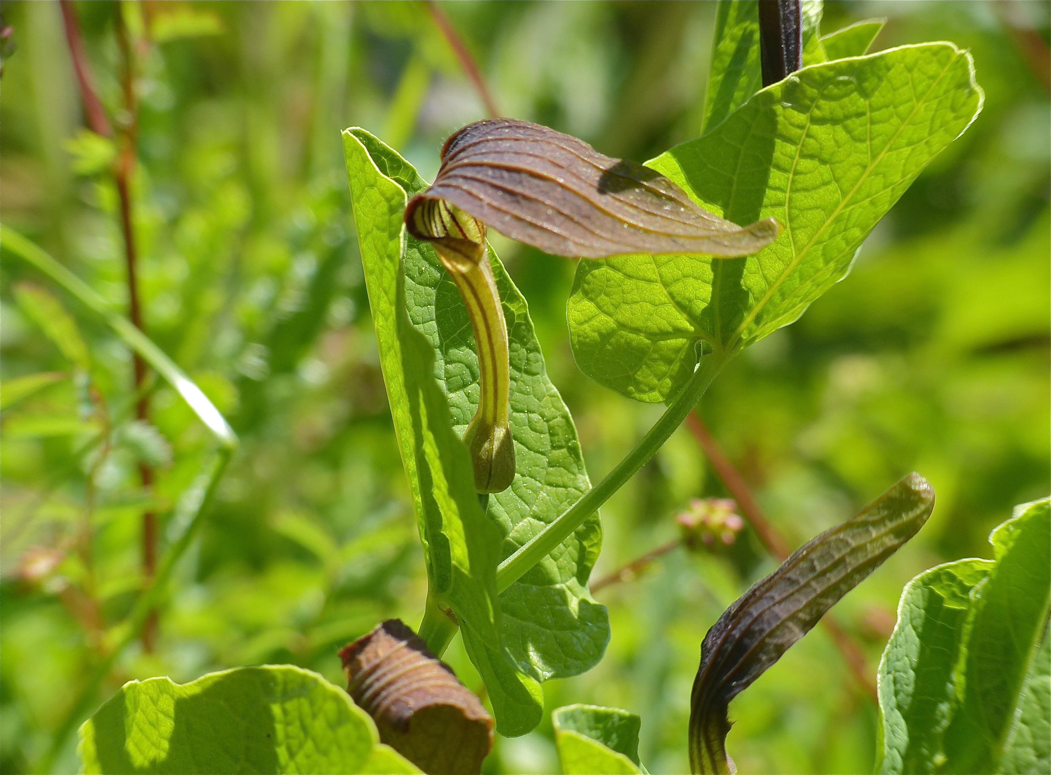 Ceilhes-et-Rocozels, Hérault, FRANCE